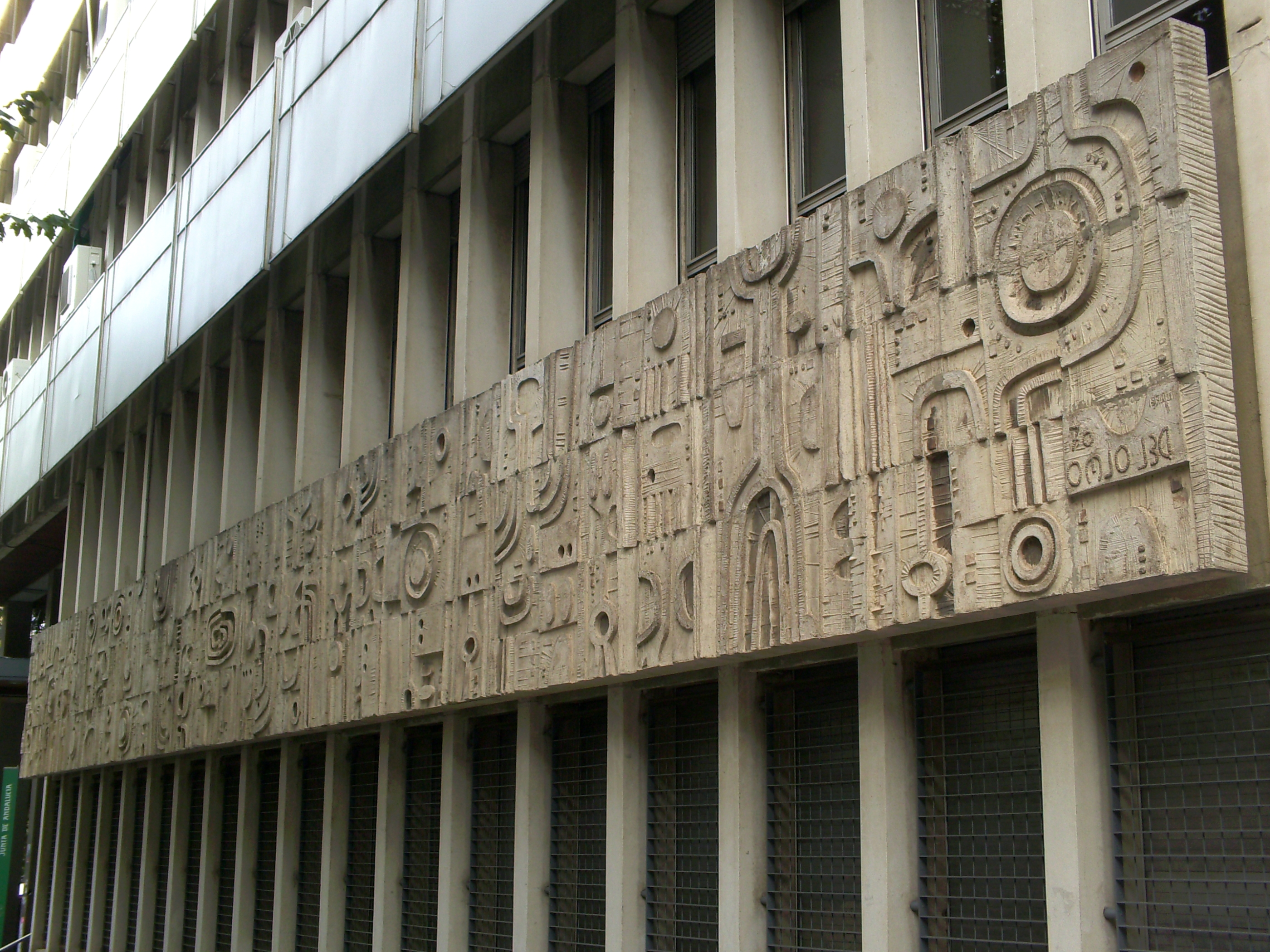 Escultura de la Casa Sindical, de Miguel Fuentes del Olmo, en Jaén.